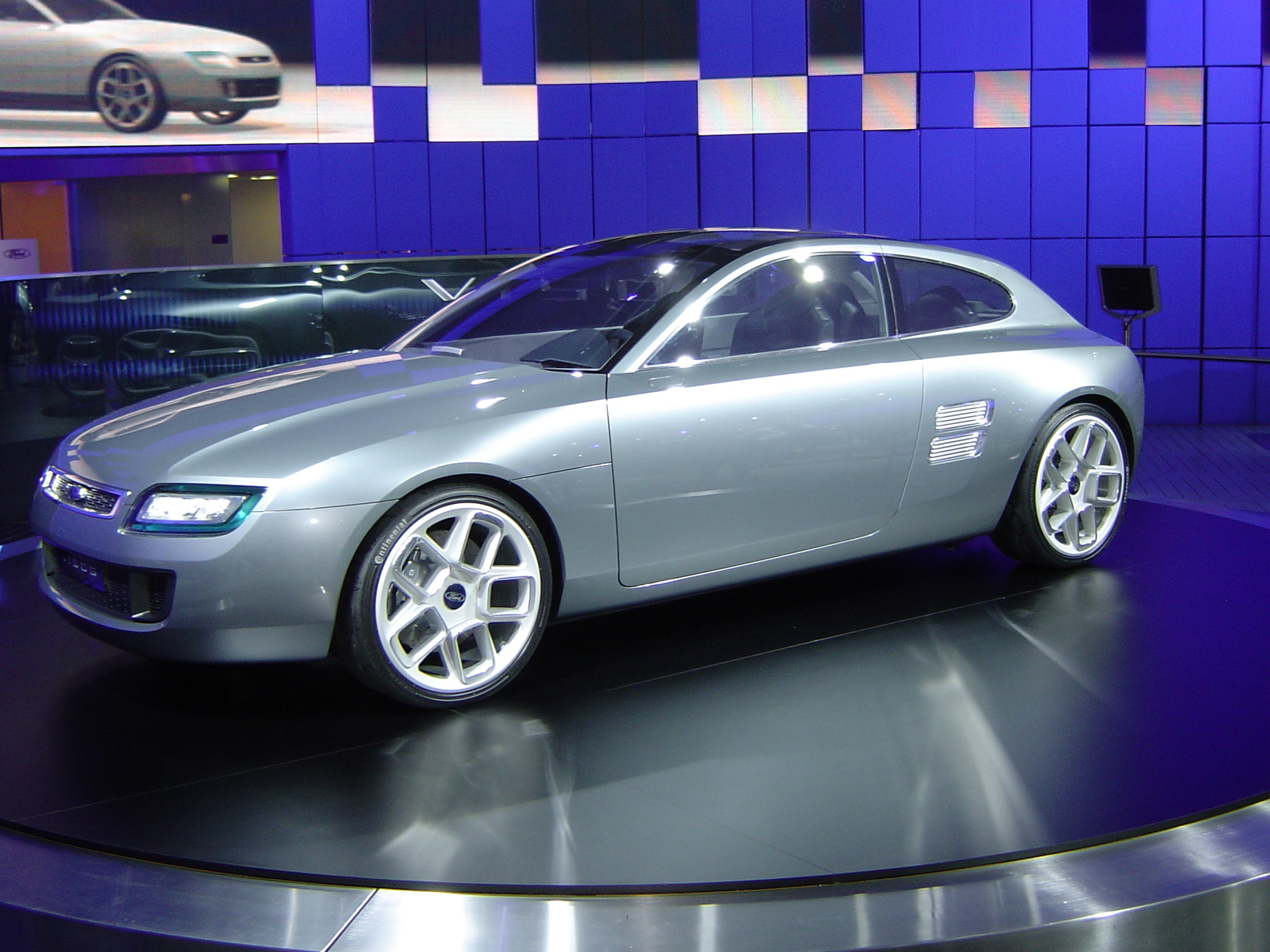 IAA_2003_125